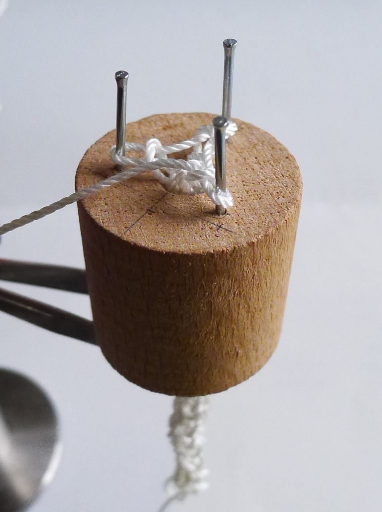 Een houten punnikklosje met drie spijkers. Drie spijkers is het minimumaantal om te kunnen punniken.